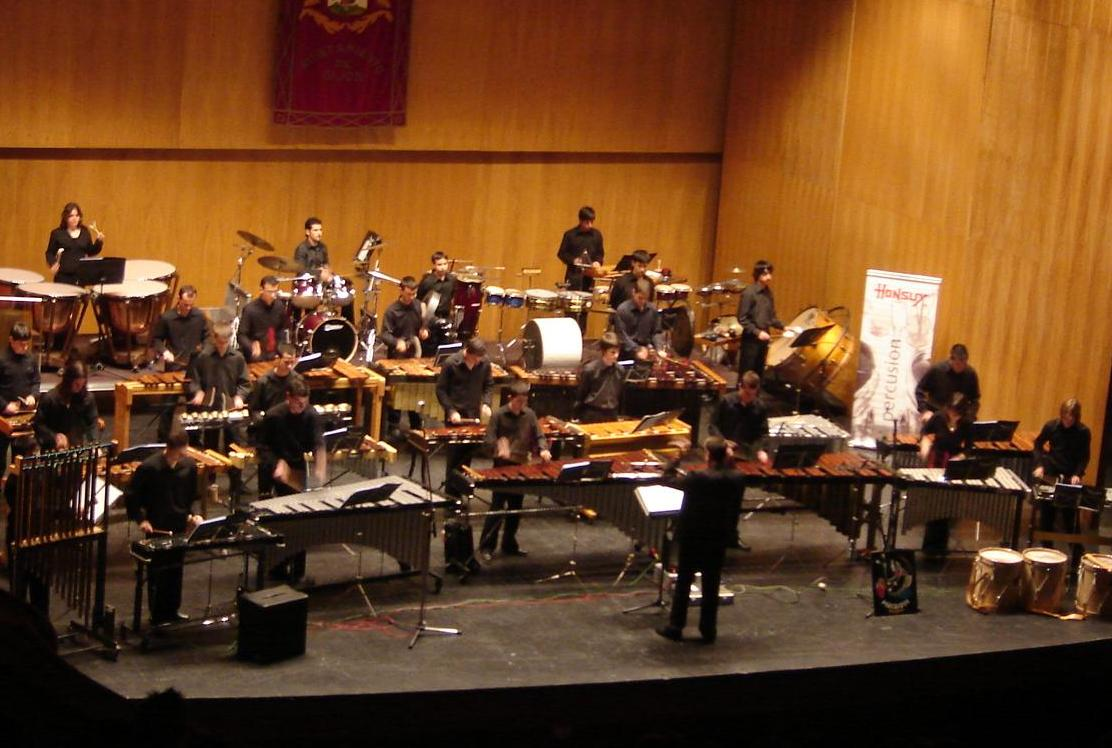 Percujove en su concierto en el Teatro Jovellanos de Gijón, martes día 18 de abril de 2006, a las 11:00 horas, ante 700 escolares. Programas educativos "Musica, maestro" y "No te lo pierdas" de la Fundación Municipal de Cultura, Educación y Universidad Popular de Gijón